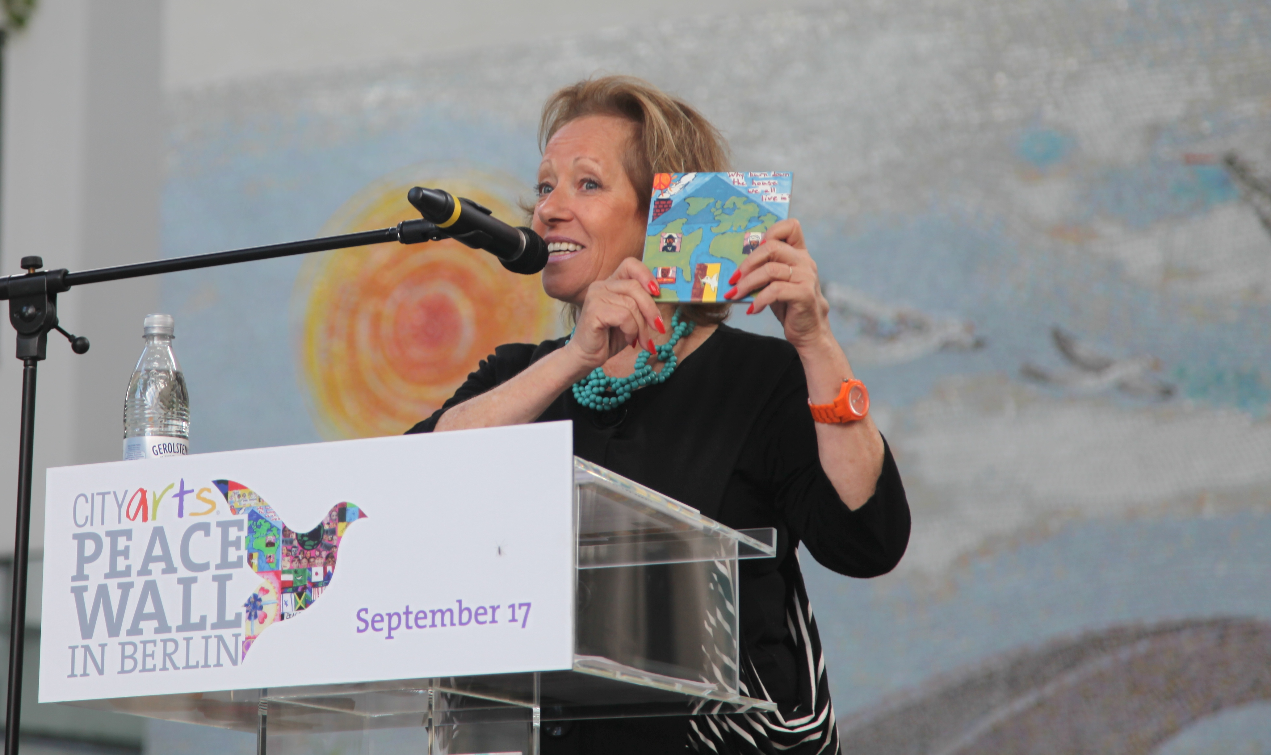 Eröffnungszeremonie der CITYarts Berlin Peace Wall – Art Director Tsipi Ben-Haim